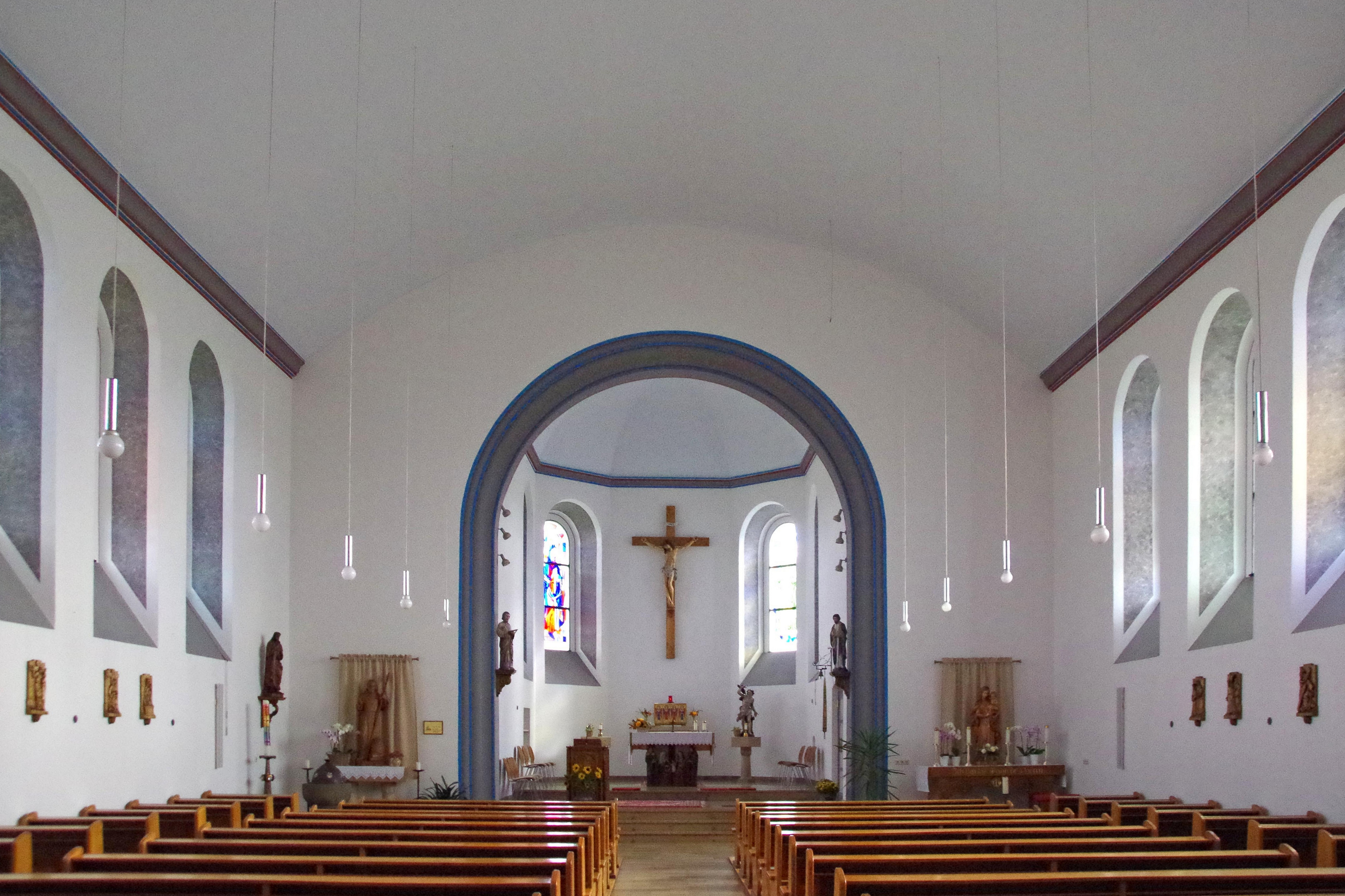 St. Bernhard (Hollerath), Blick ins Kirchenschiff